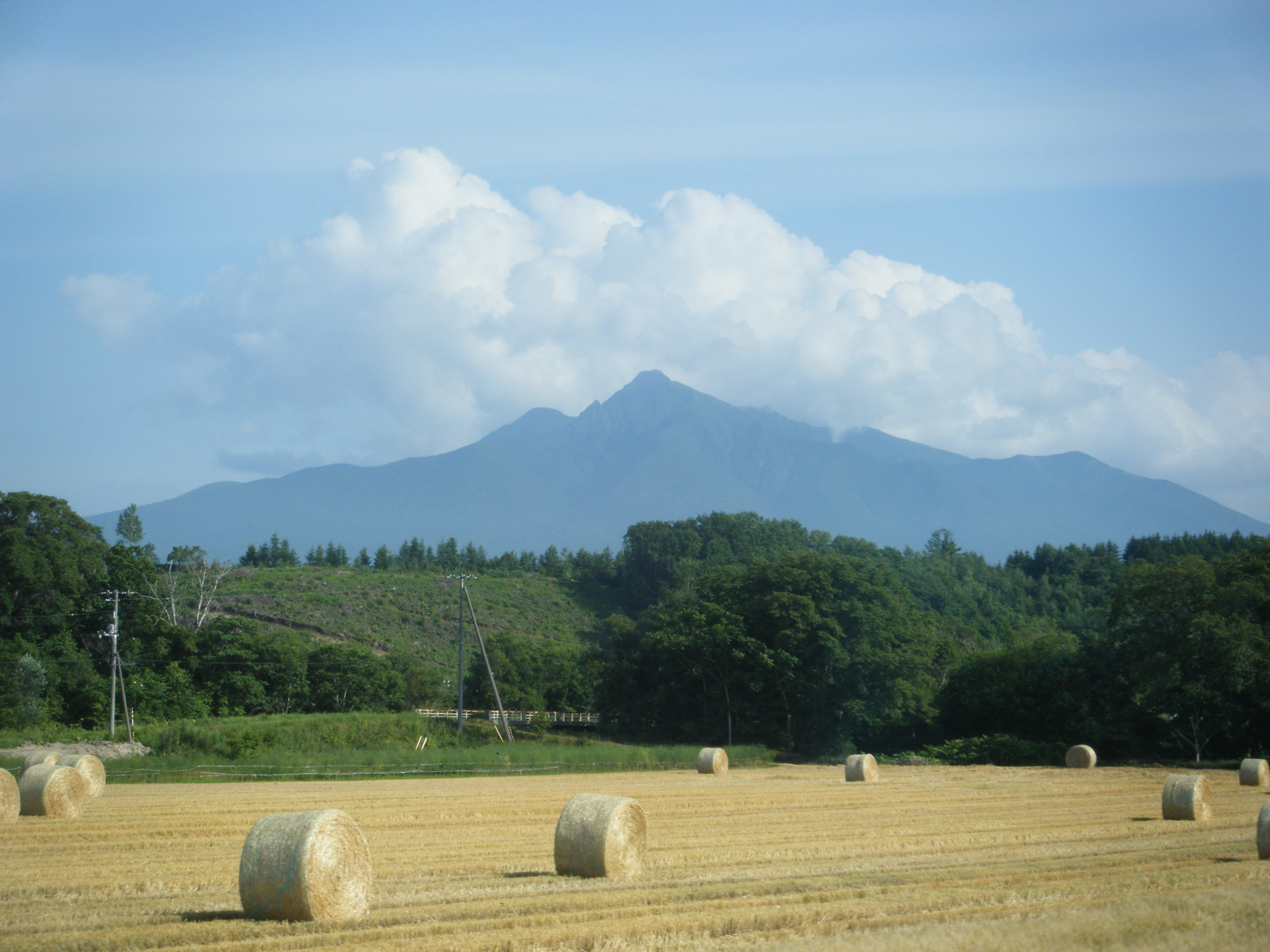 斜里岳と牧草地。釧網本線普通列車車内より。